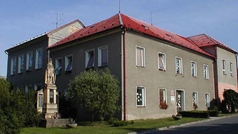 Základní škola Doloplazy